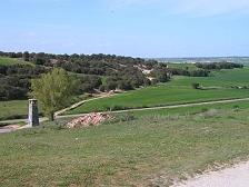 Monte de la endaya de Quintanilla de la Mata